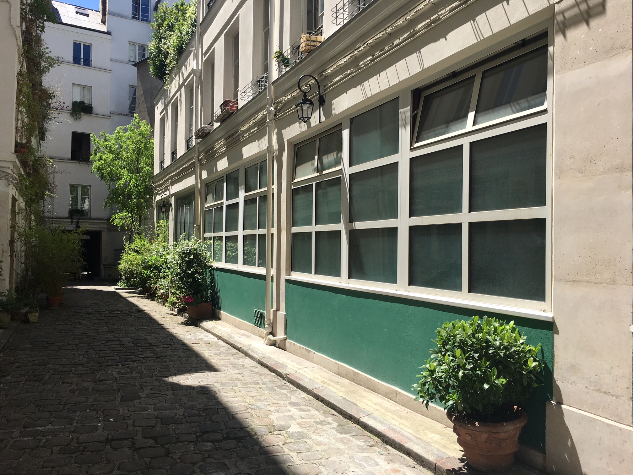 Cour de l'Ours. Facade du batiment du rez-de-chaussée ouest.